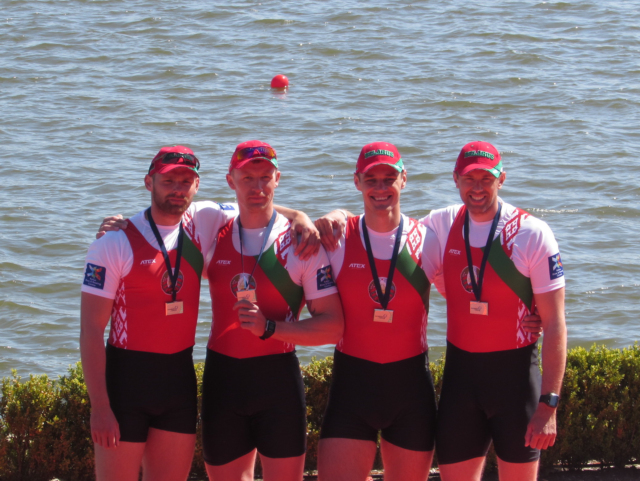 Wadim Ljalin, Denis Mihal, Nikolai Scharlap, Ihor Paschewitsch, Ruder-EM 2016